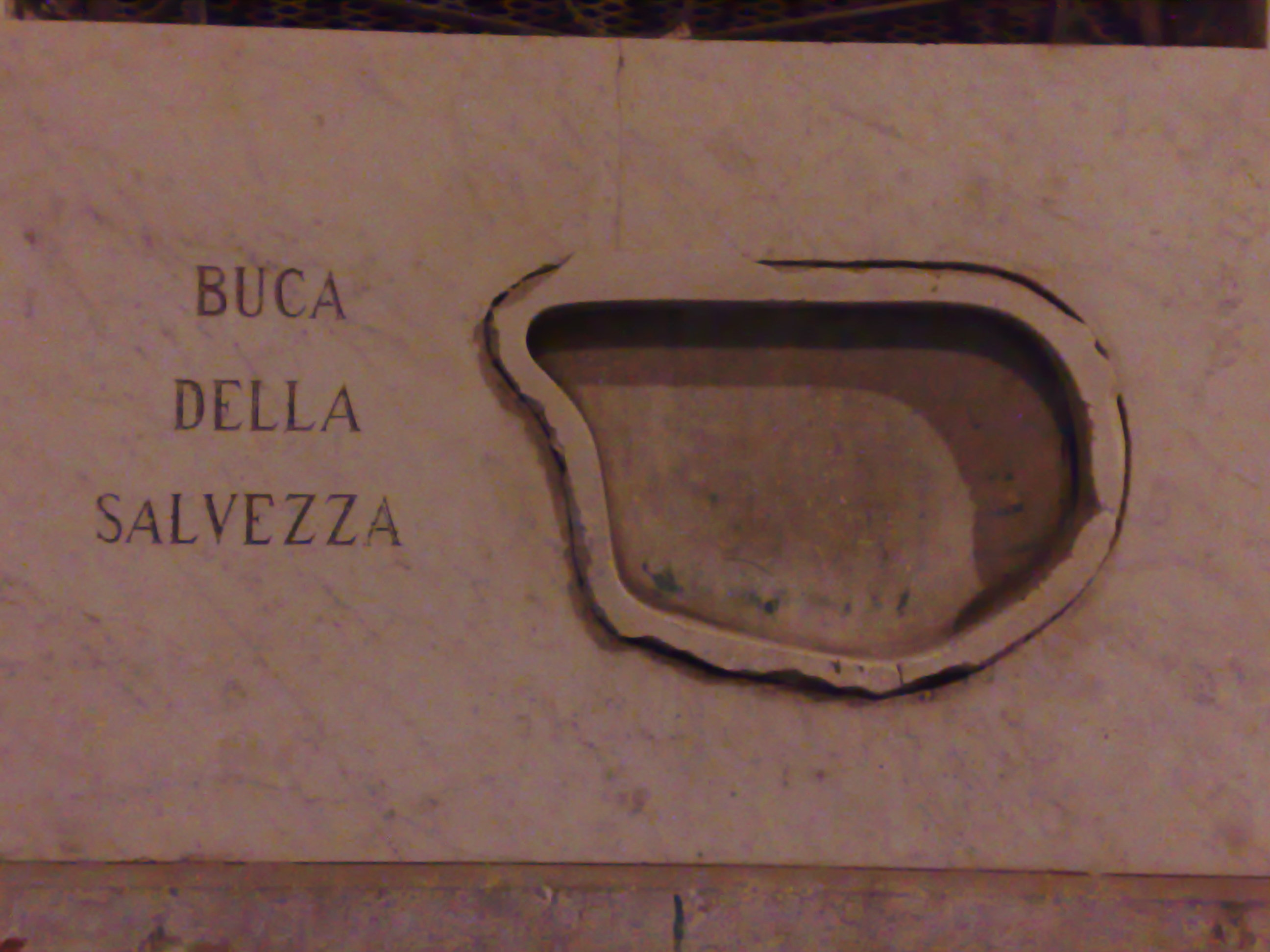 Buca della salvezza, Palermo